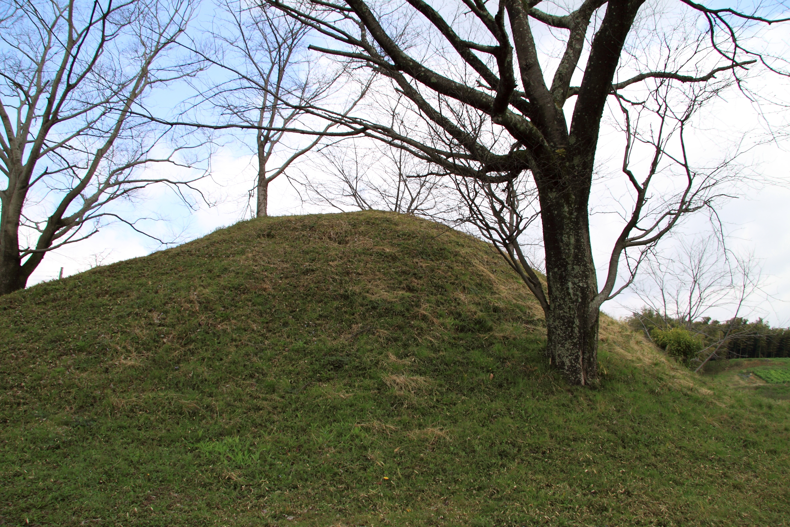 岩屋山古墳の墳丘